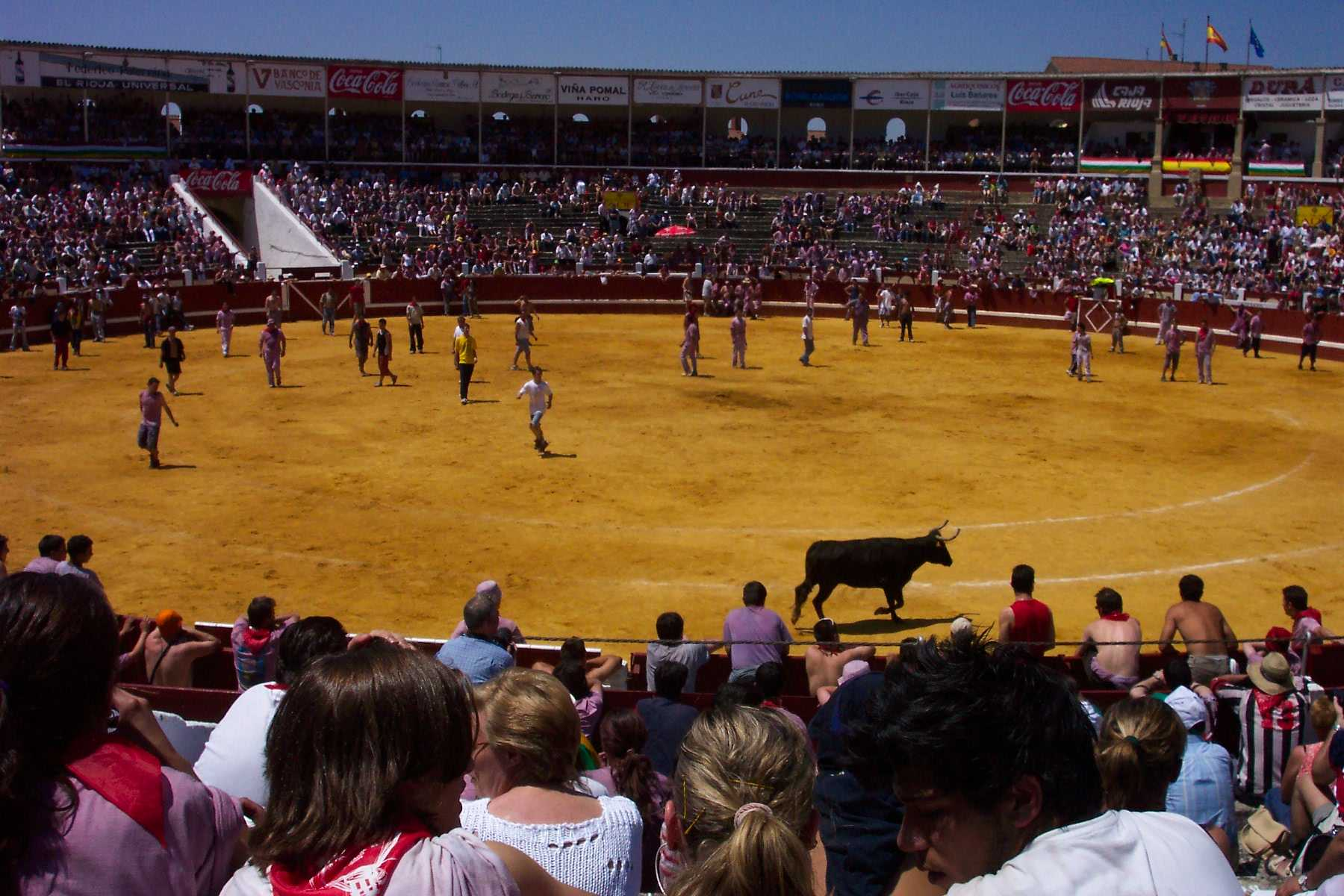 Suelta de vaquillas después de la Batalla Suelta de Vaquillas despues de la Batalla del Vino en la plaza de toros de Haro